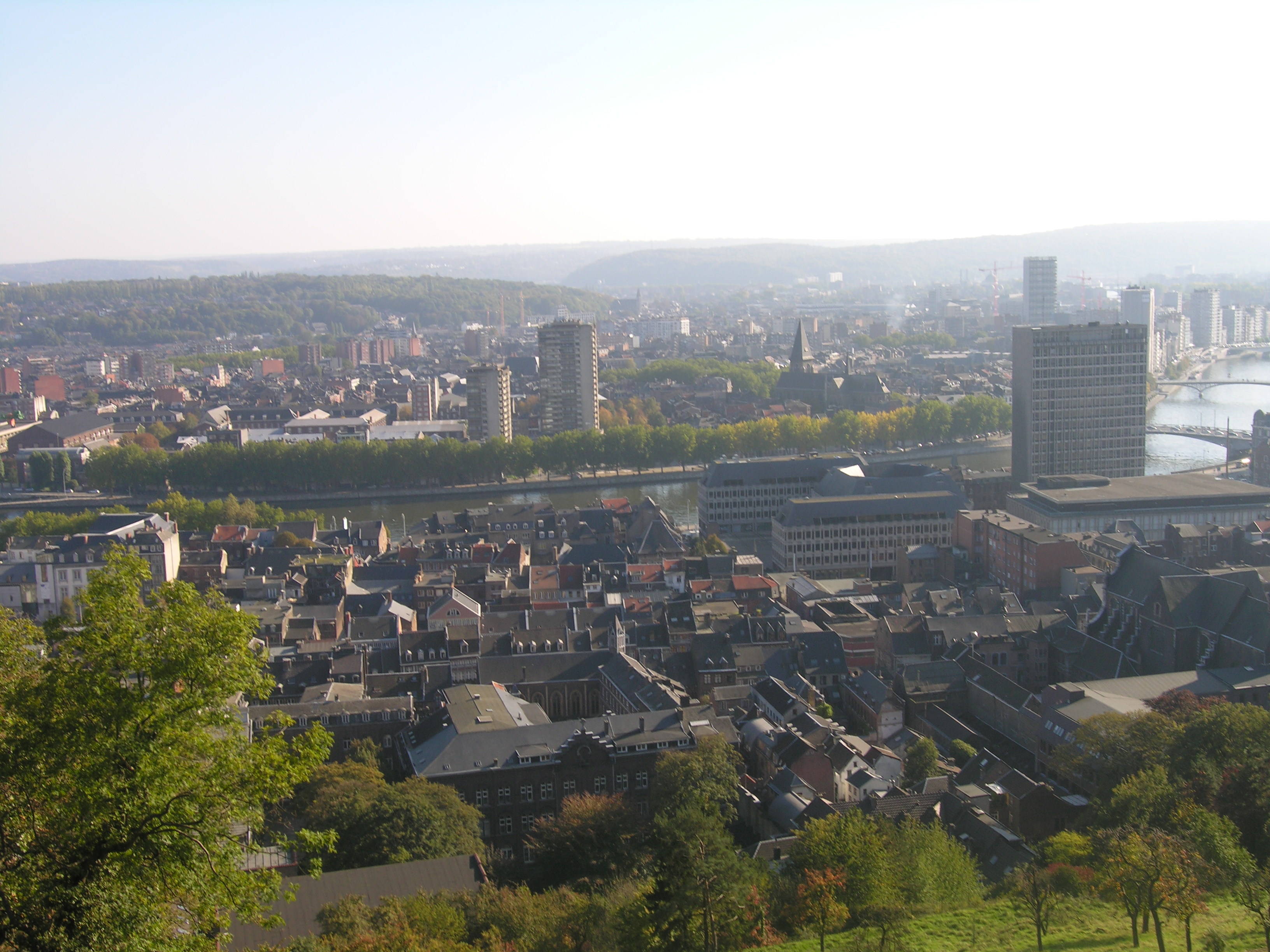 Liège, Panoroma de la ville depuis la Citadelle